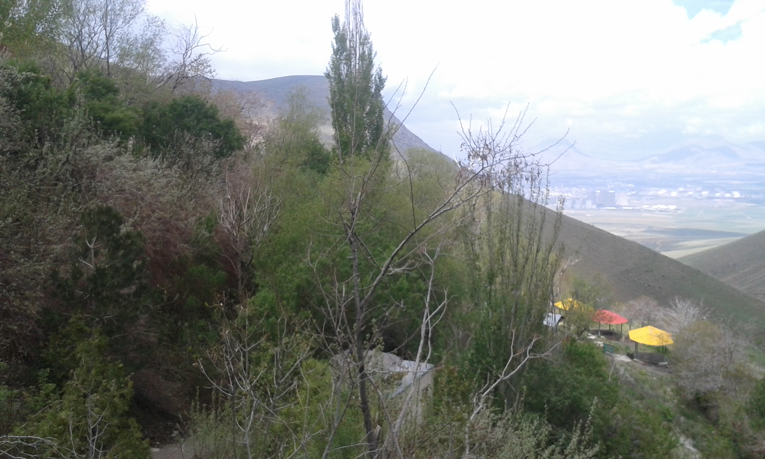 شهرستان اراک - سفیدخانی